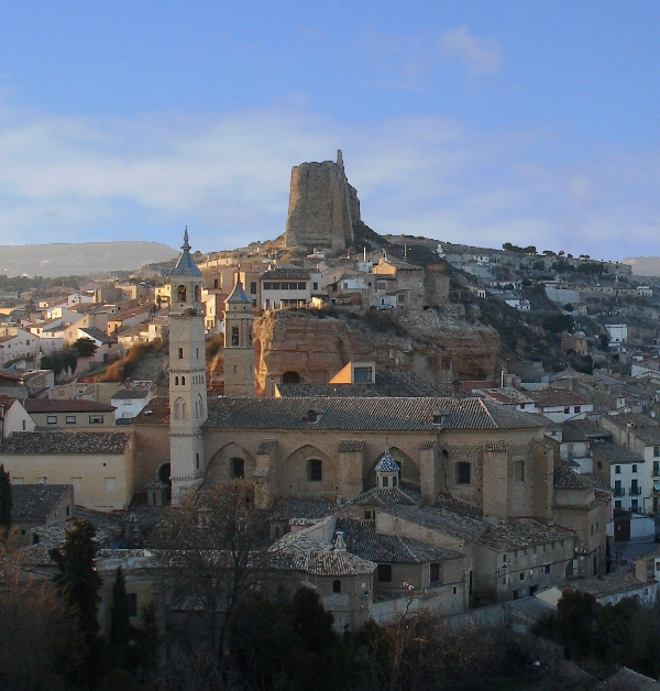 Colegiata de Santa María y el Castillo